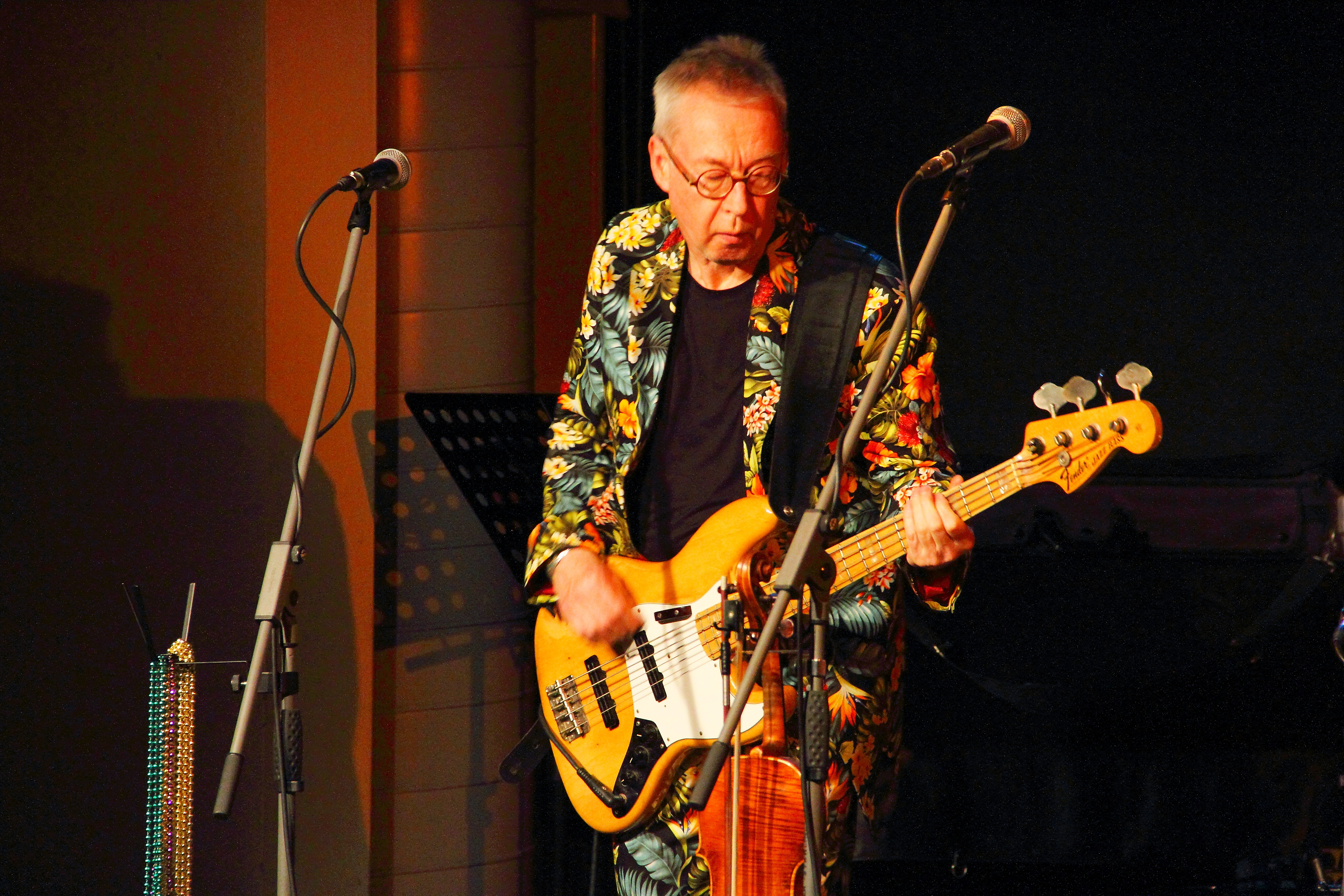 Die Cajun Roosters im KULT in NIederstetten.